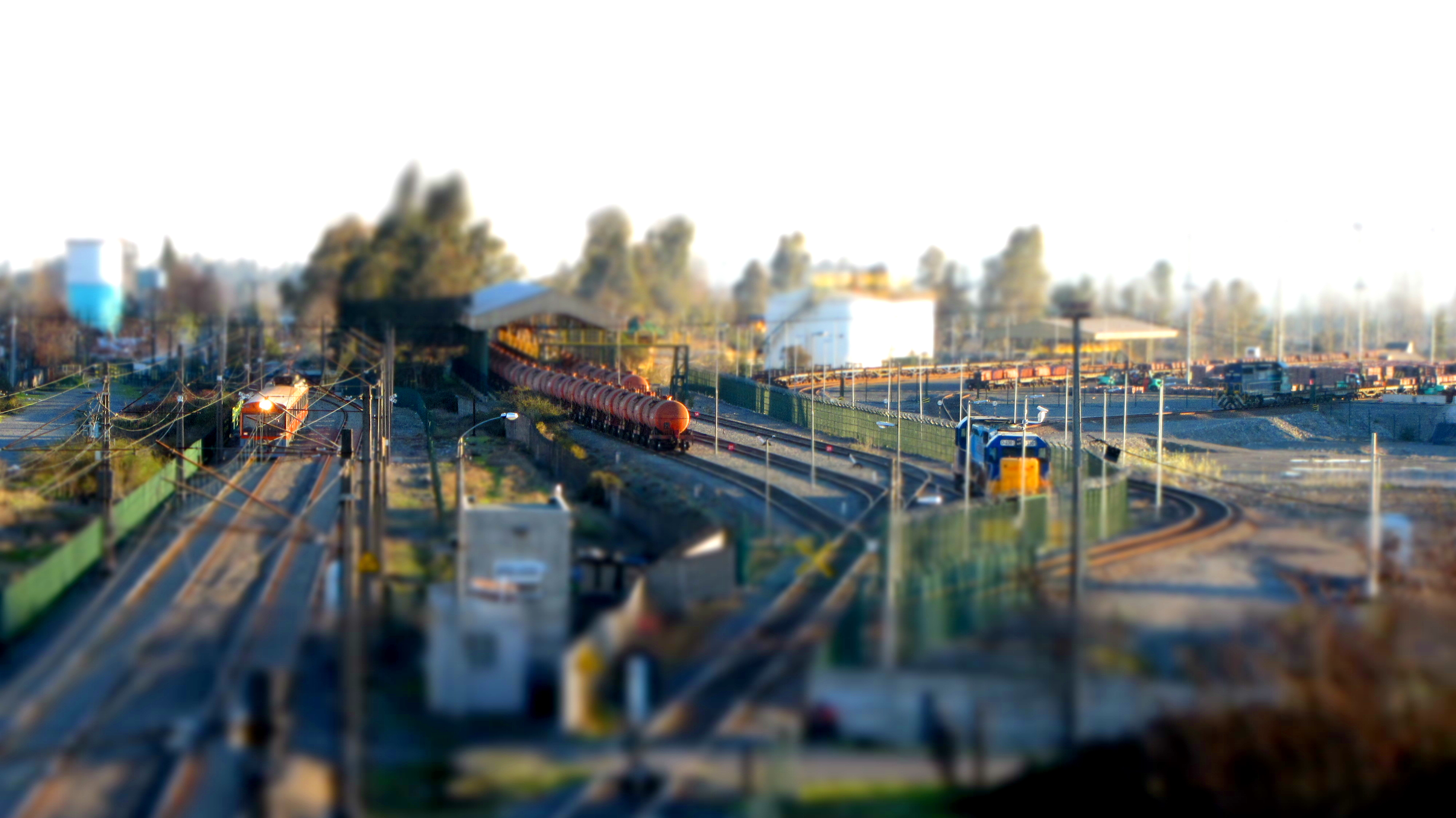 Llegada del tren 50.991 al Patio de Transferencia de Los Lirios.